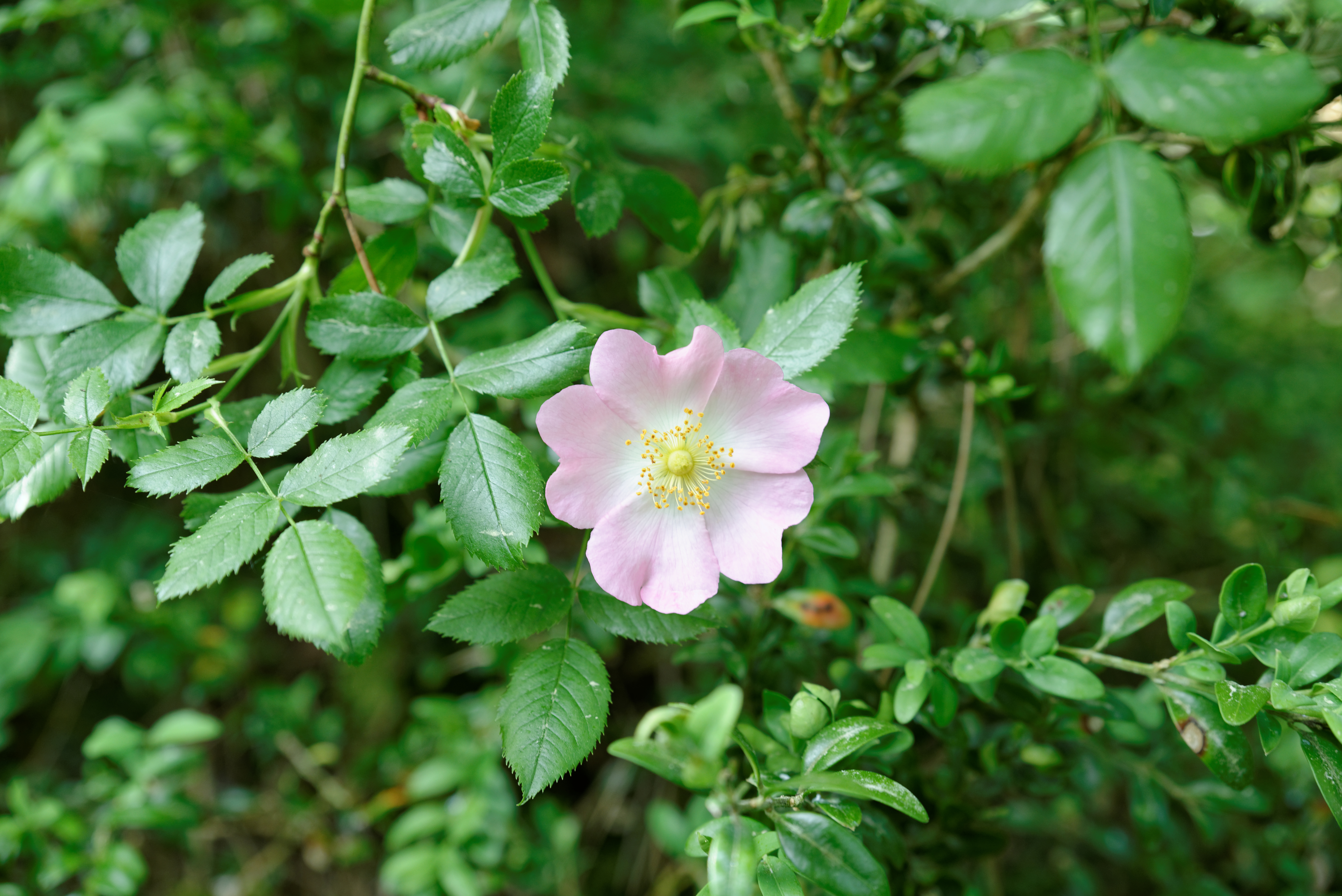 Fleur d'églantier, dans le parc de la combe à la serpent (Dijon, Côte d'or, France).